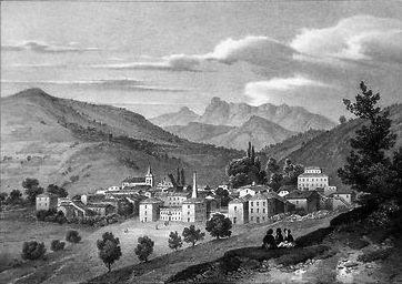 Gravure du XIX siècle de Allevard-les-Bains.